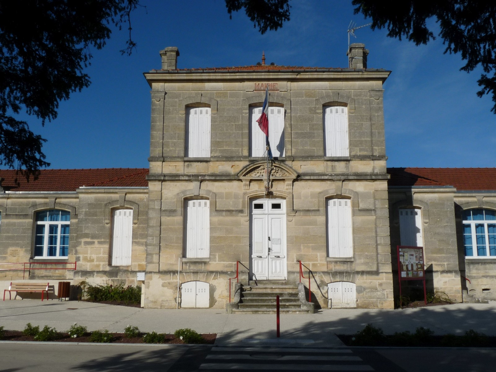 Mairie de Saint-Paul, Gironde, France